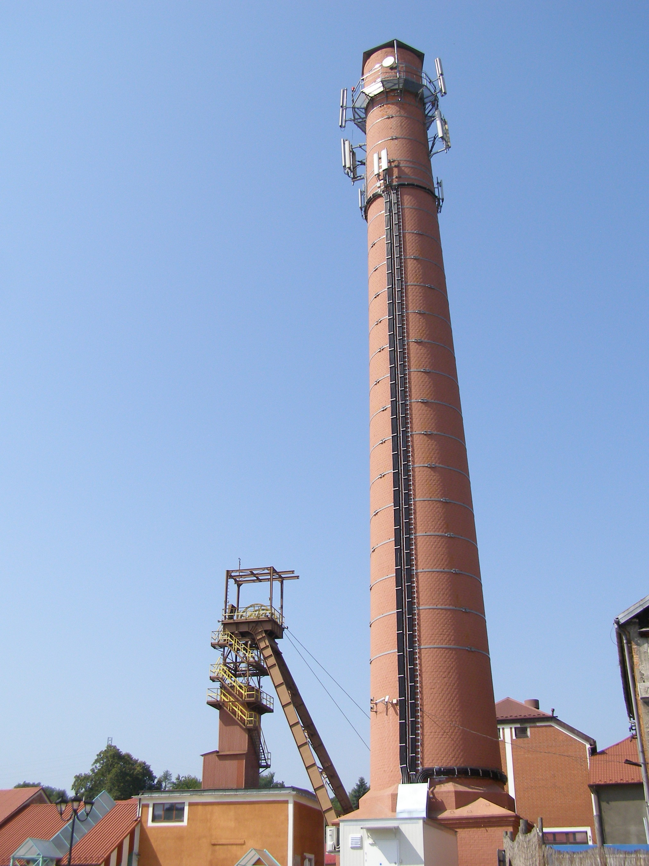 Bochnia - Kopalnia Soli, szyb Campi